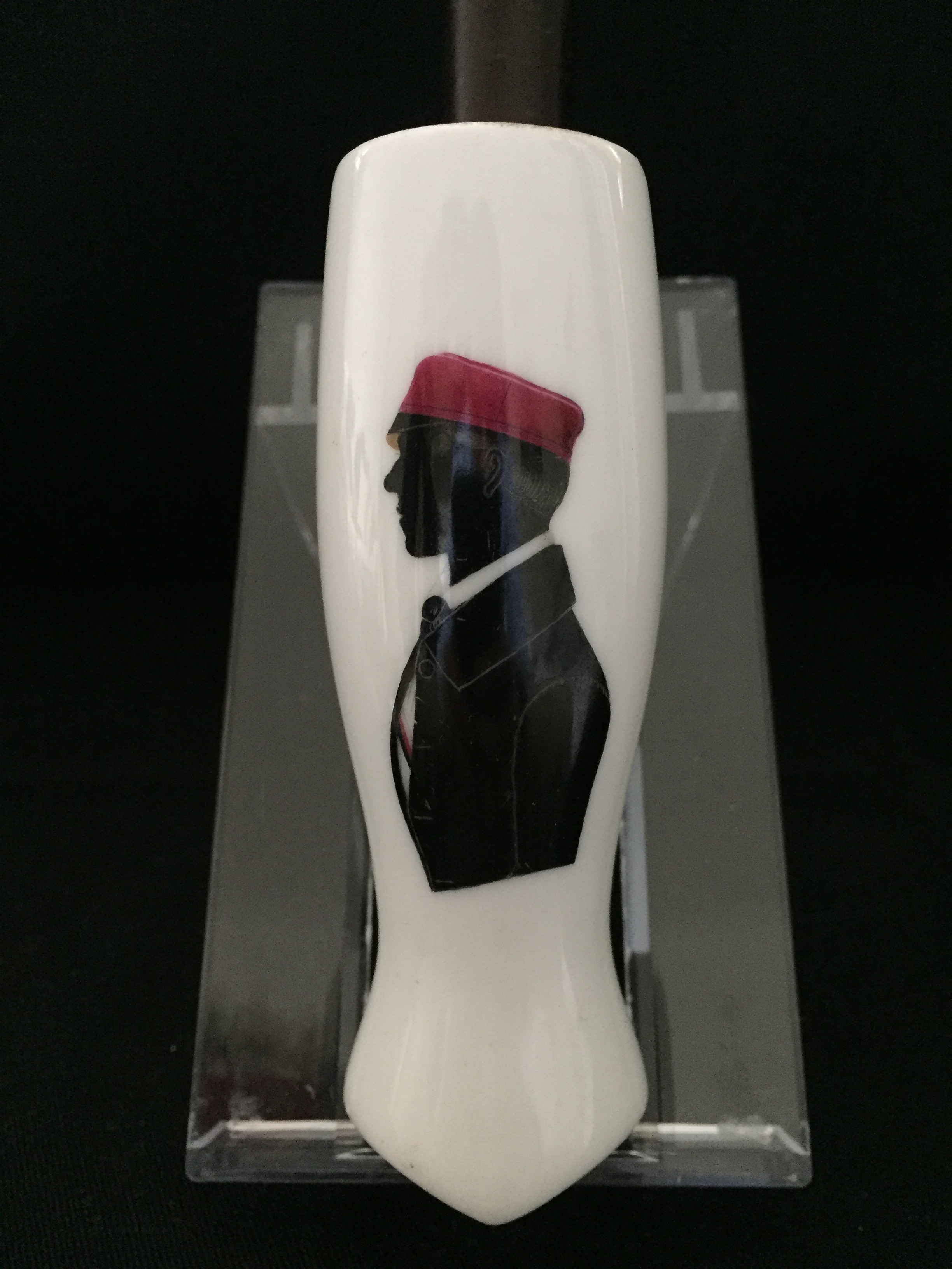 Porzellanpfeifenkopf der Salingia Halle aus dem Jahr 1851